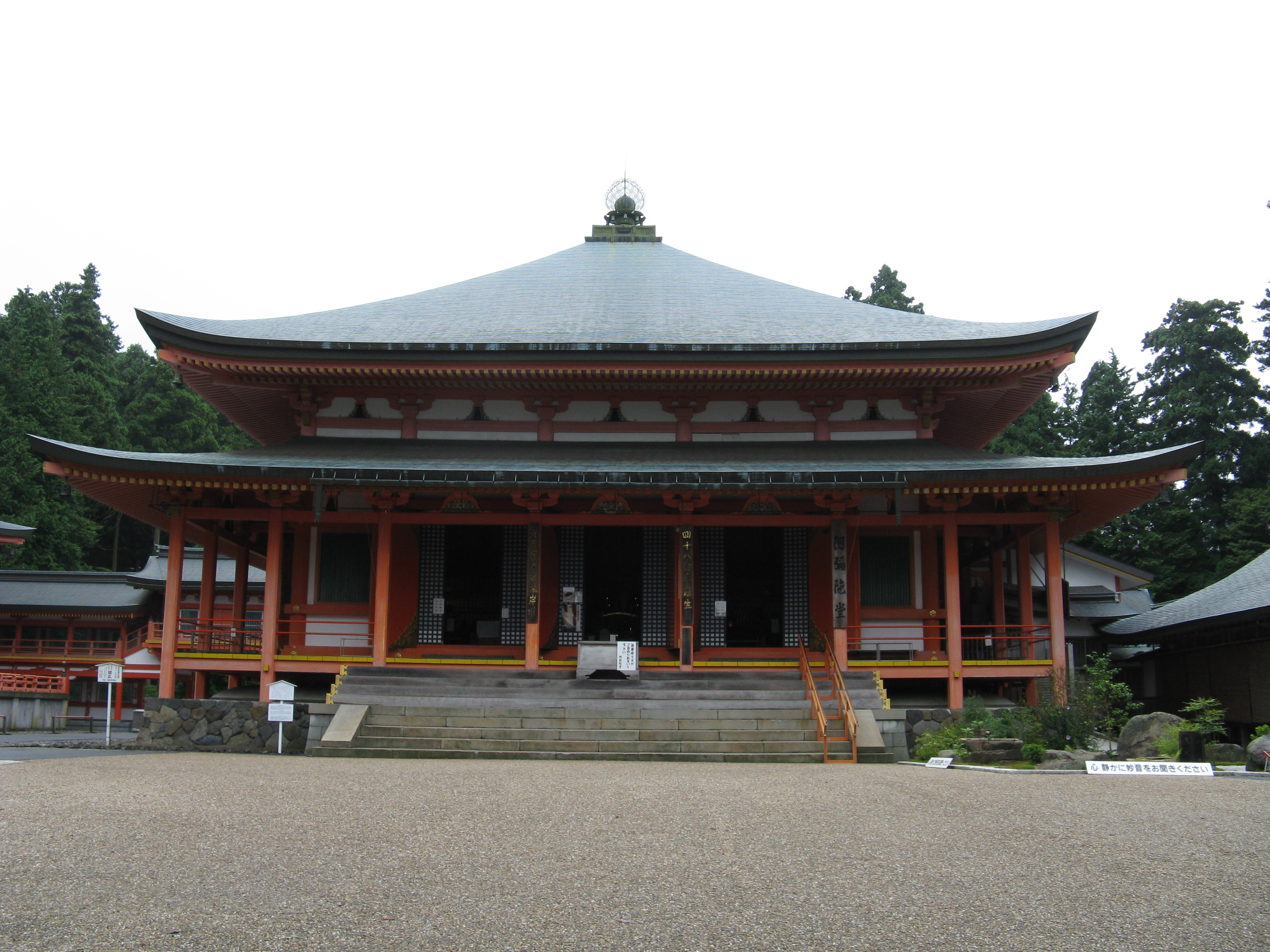 延暦寺 阿弥陀堂